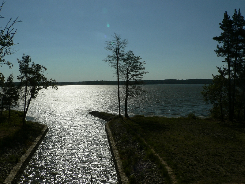 Rybnik Rožmberk, pond Rozmberk, Czech Republic